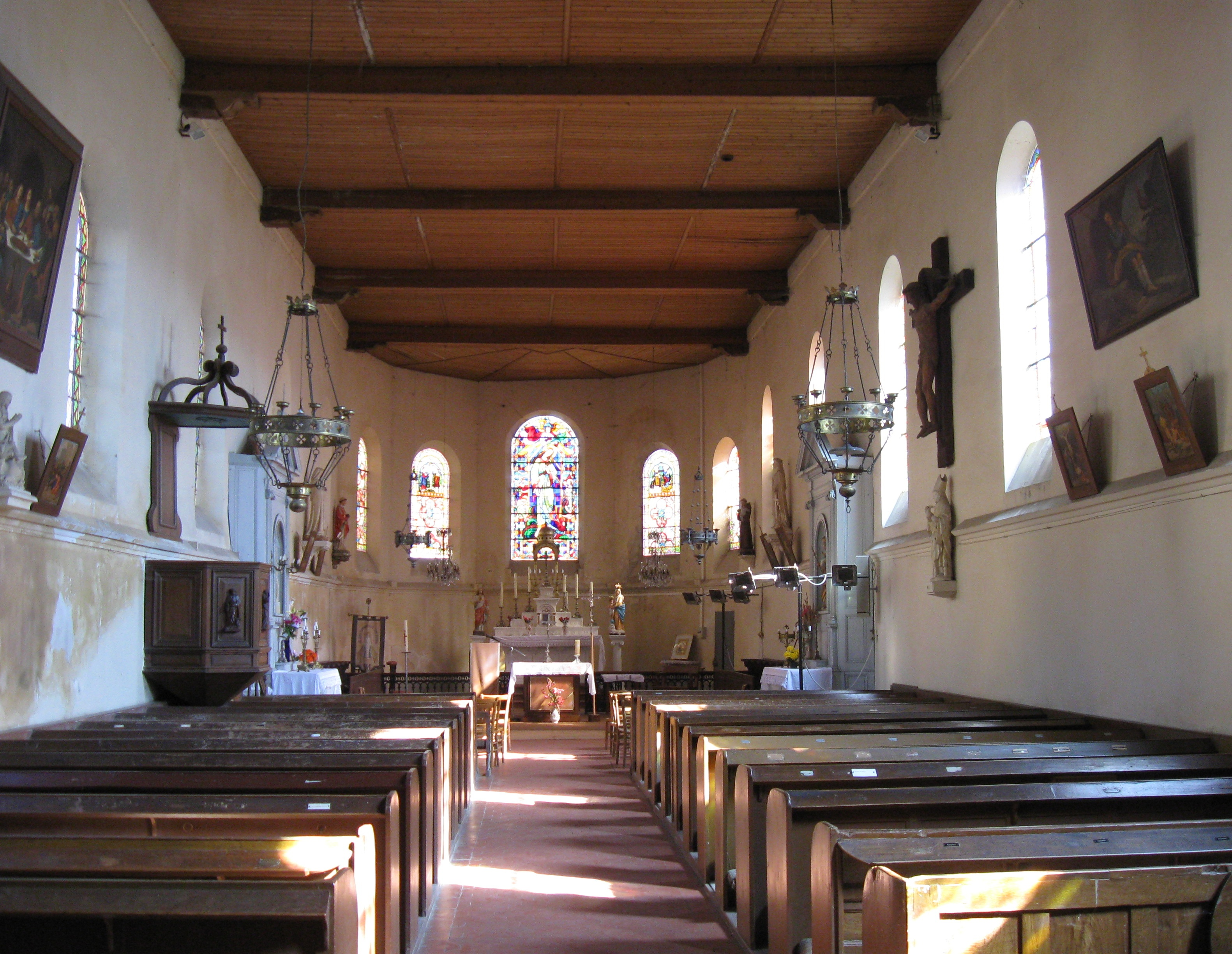 Église catholique Sainte-Marguerite-d'Antioche de Nanteuil-sur-Marne. (département de Seine-et-Marne, région Île-de-France).